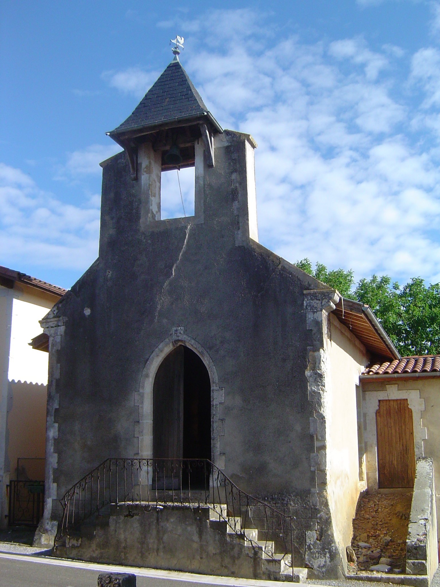 Capèra de Pojalèr, Sent Aubin, Shalòssa, Gasconha